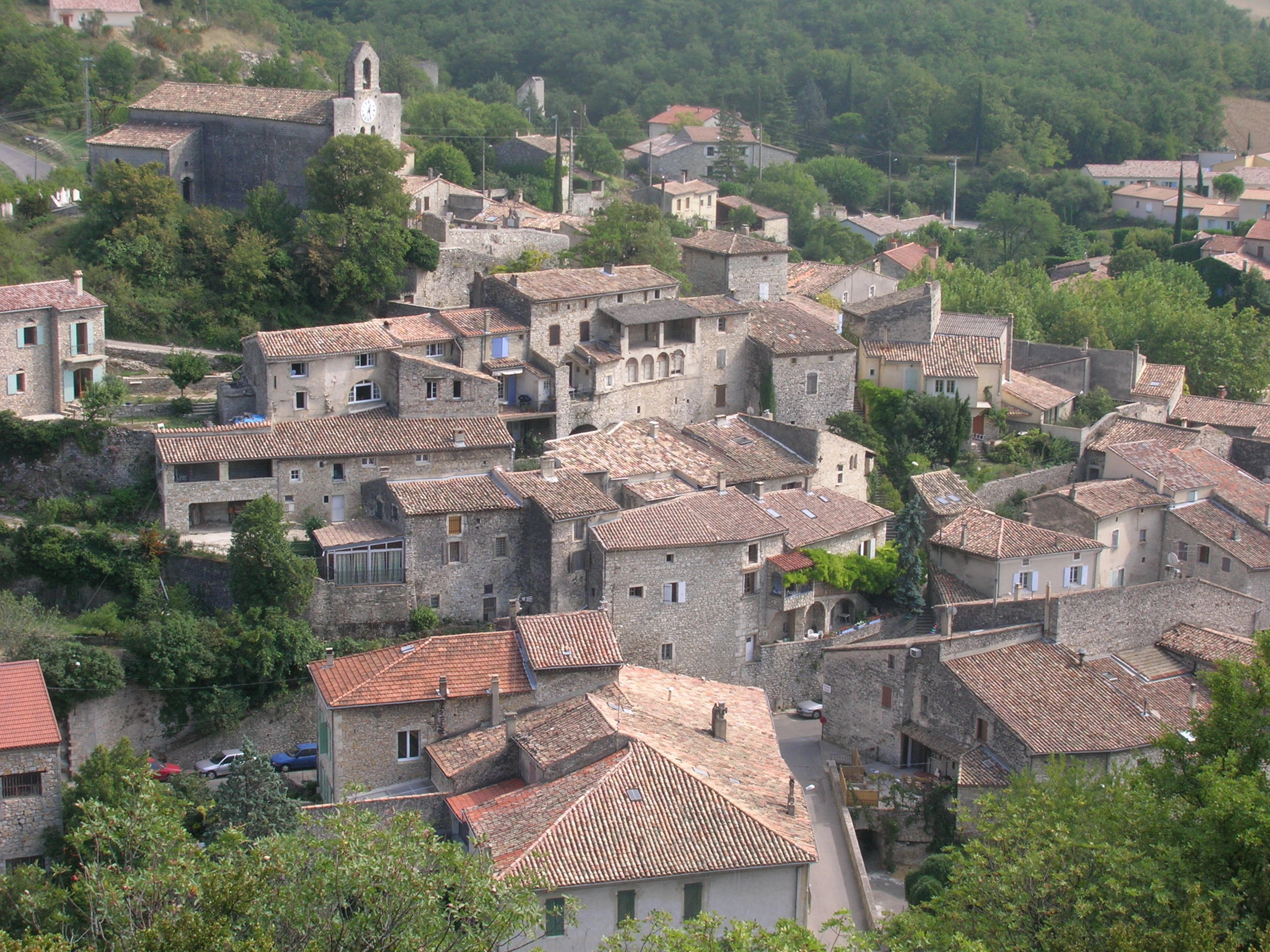 Pont de Barret (France 26160) vue de la vierge (Septembre 2006)